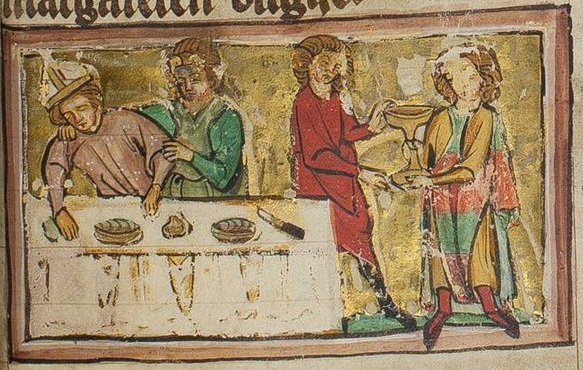 Der Tod Rudolfs von Dingelstädt als Miniatur in einer Handschrift der "Sächsischen Weltchronik" aus der zweiten Hälfte des 13. Jahrhunderts.